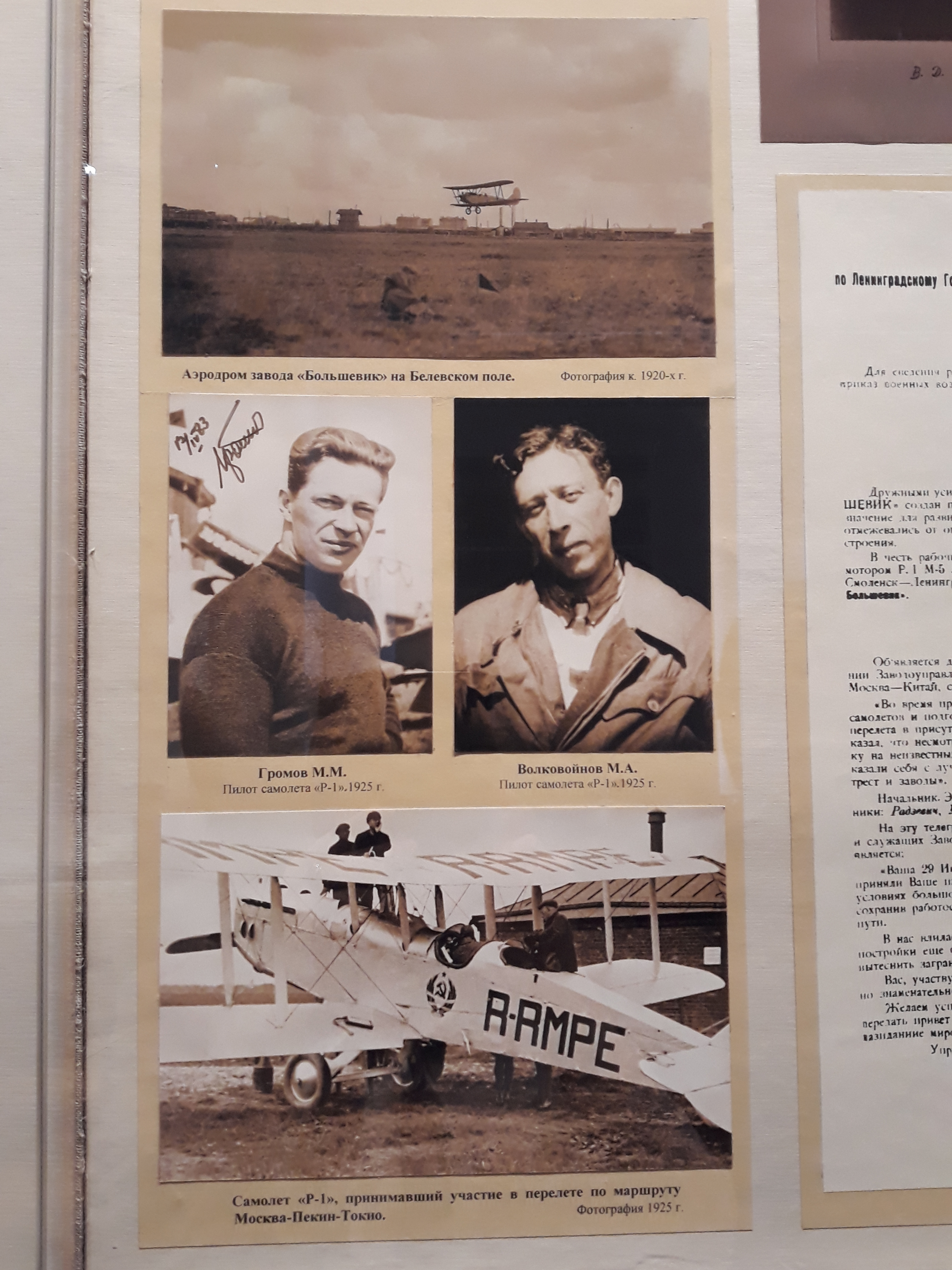 Музей Обуховского завода. Аэродром завода "Большевик" на Белевском поле.фото конца 1920-х г. 2)Громов В.В.- пилот самолета "Р-1", 1925 г. 3)Волковойнов М.А. пилот самолета "Р-1", 1925 г. 3) Самолет "Р-1", принимавший участие в перелете по маршруту Москва-Пекин-Токио. Фотография 1925 года